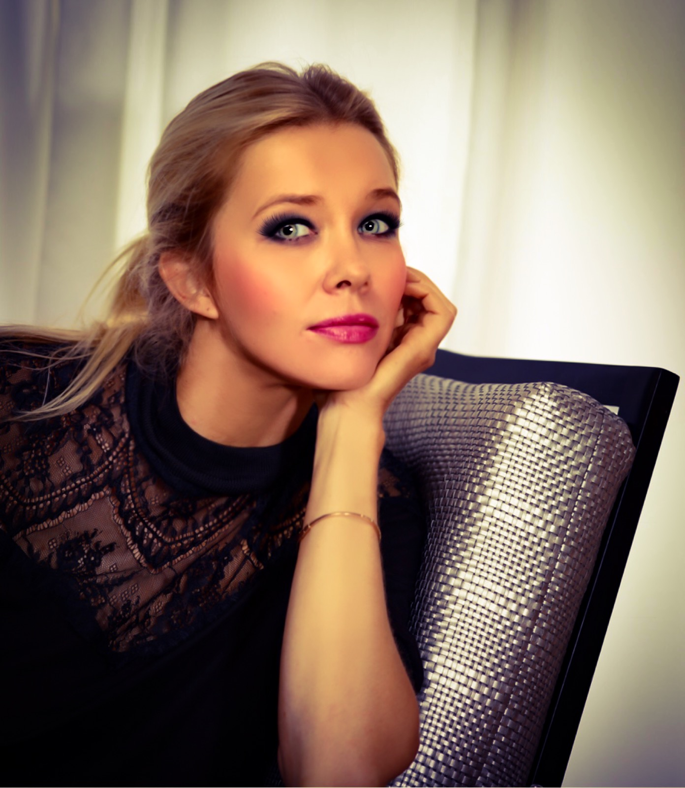 Laura Karasek-Briggs